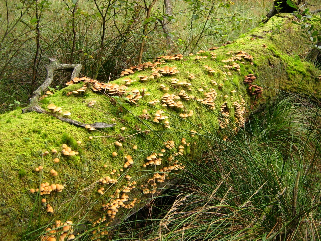 Totholz in einem Kesselmoor am Teufelssee bei Thelkow, etwas ausserhalb des Naturschutzgebietes Teufelssee bei Thelkow.